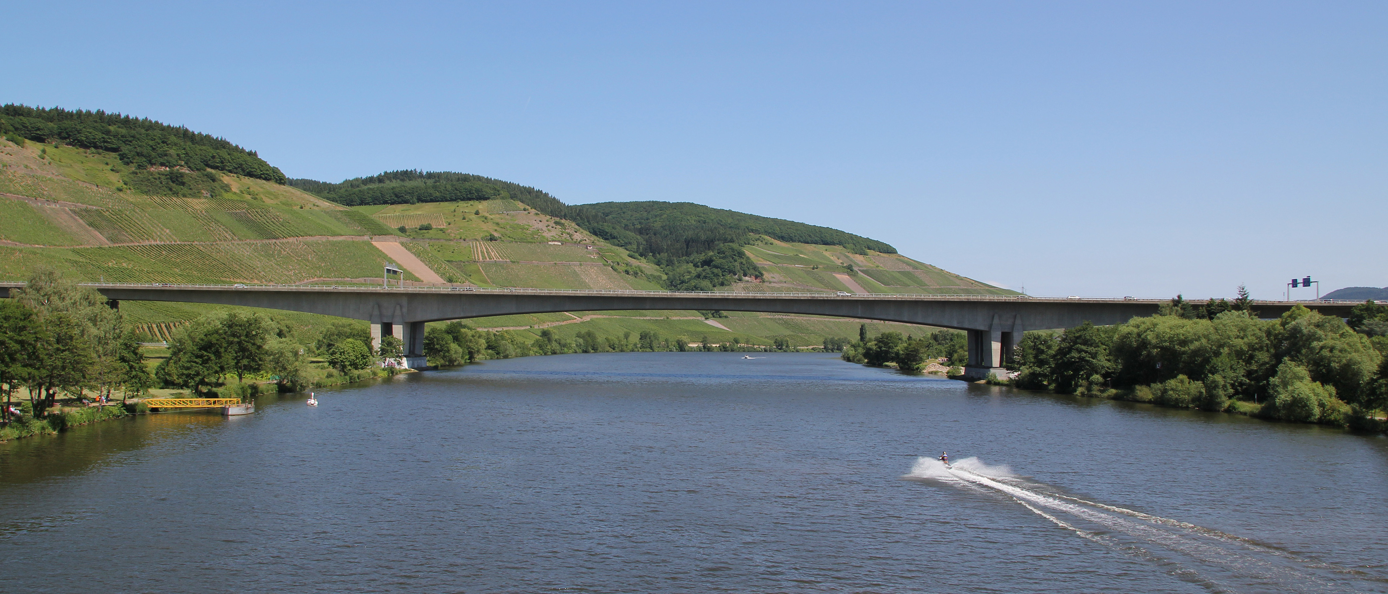 Die Moseltalbrücke zwischen Schweich und Longuich